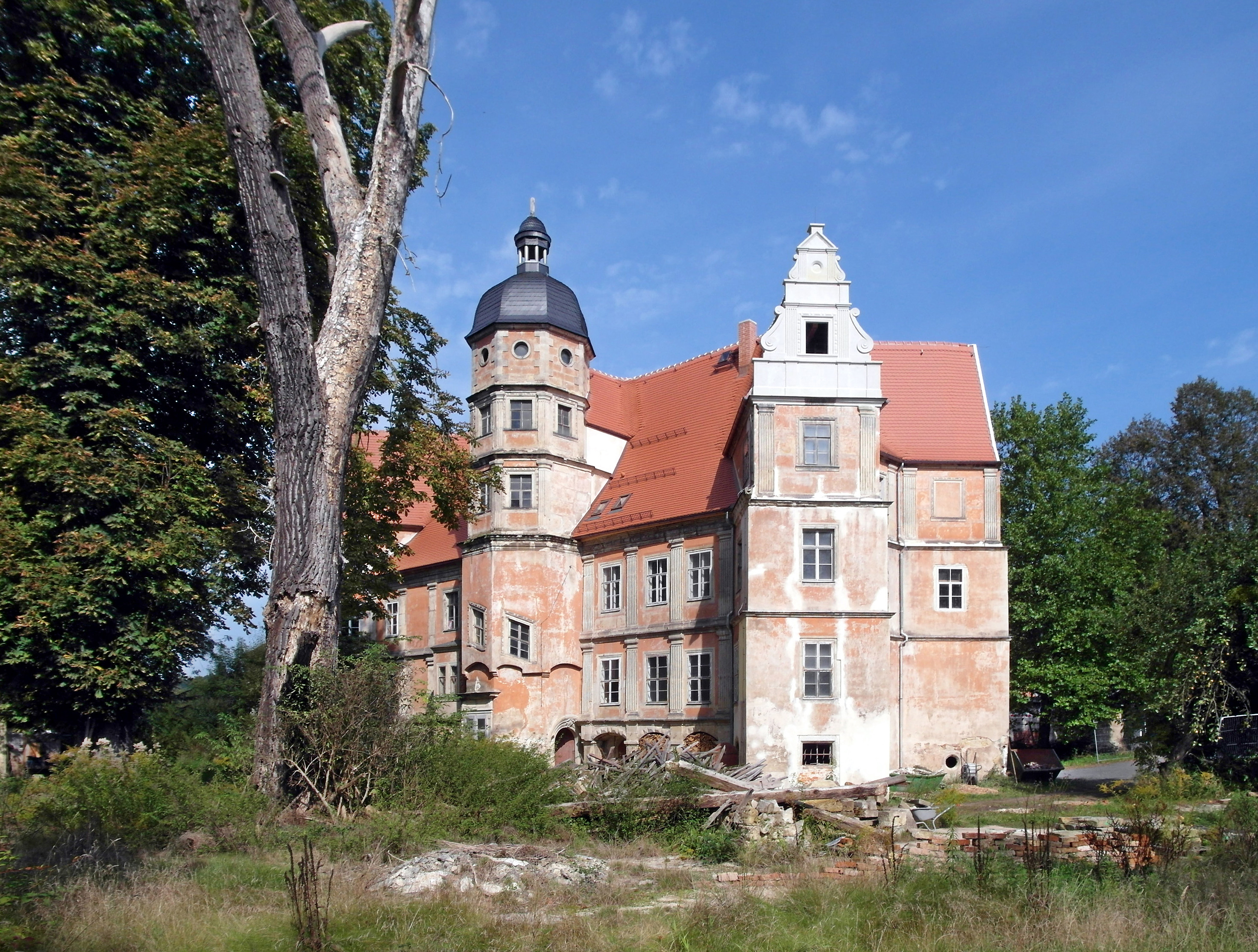 23.09.2016 01796 Rottwerndorf (zu Pirna): Renaissanceschloß Rottwerndorf, Alt-Rottwerndorf 24. Sicht von Süden. Bauzeit 1556-1579. Bauherr war Damian von Sebottendorf, Kursächsischer Kammerherr. Später wechselte der Besitz im Adel an die von Berbisdorf, von Miltitz u. von Leßer. Es folgten Bürgerliche, zuletzt ab 1917 der Dresdner Tabakfabrikant Hugo Zietz. 1927 kaufte die Stadt Pirna die Anlage, in die 1945 Flüchtlingen einzogen. Von 1953 bis 1990 war hier ein Volkseigenes Gut. In dieser Zeit wurde das Schloß saniert. Ab 1990 gehört es wieder der Stadt Pirna, Bis 1998 waren hier Wohnungen. Der Bauträger Uniprof AG aus Stuttgart hatte d.Objekt 1999 gekauft, ging aber 2003 in Insolvenz. Das Schloßareal verfiel zunehmend. Ein Graf von Plettenberg wollte hier die Zentrale seines Templerordens einrichten. Letztlich aber ging das Schloß im Mai 2011 an Manfred Strebl und Martin Kusic aus München, die mit der Sanierung begonnen haben. [SAM7810.JPG]20160913105DR(c)Blobelt